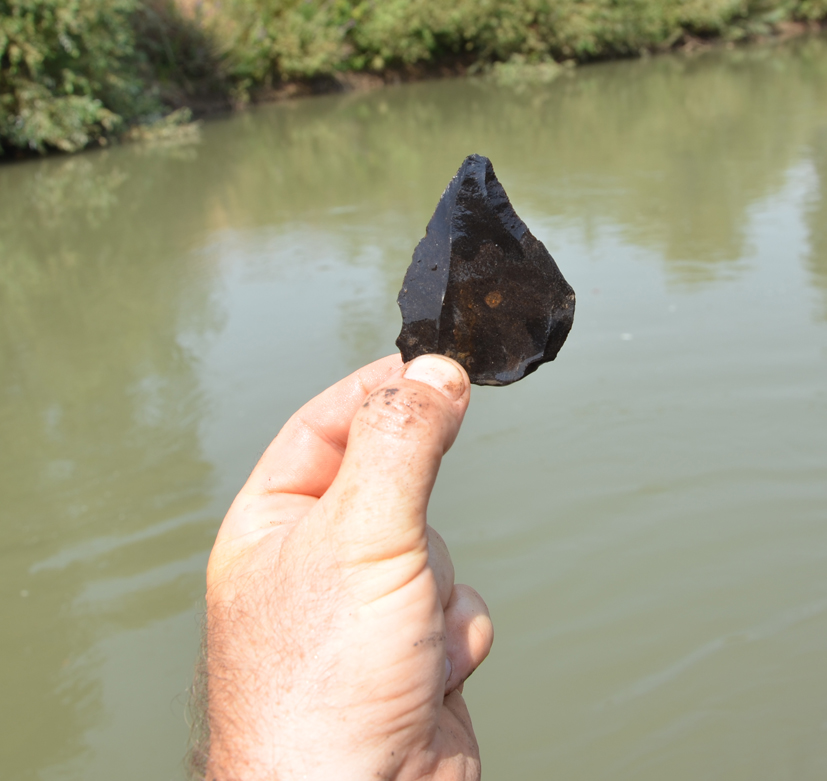 חוד לבלואה - חפירות נחל מחניים